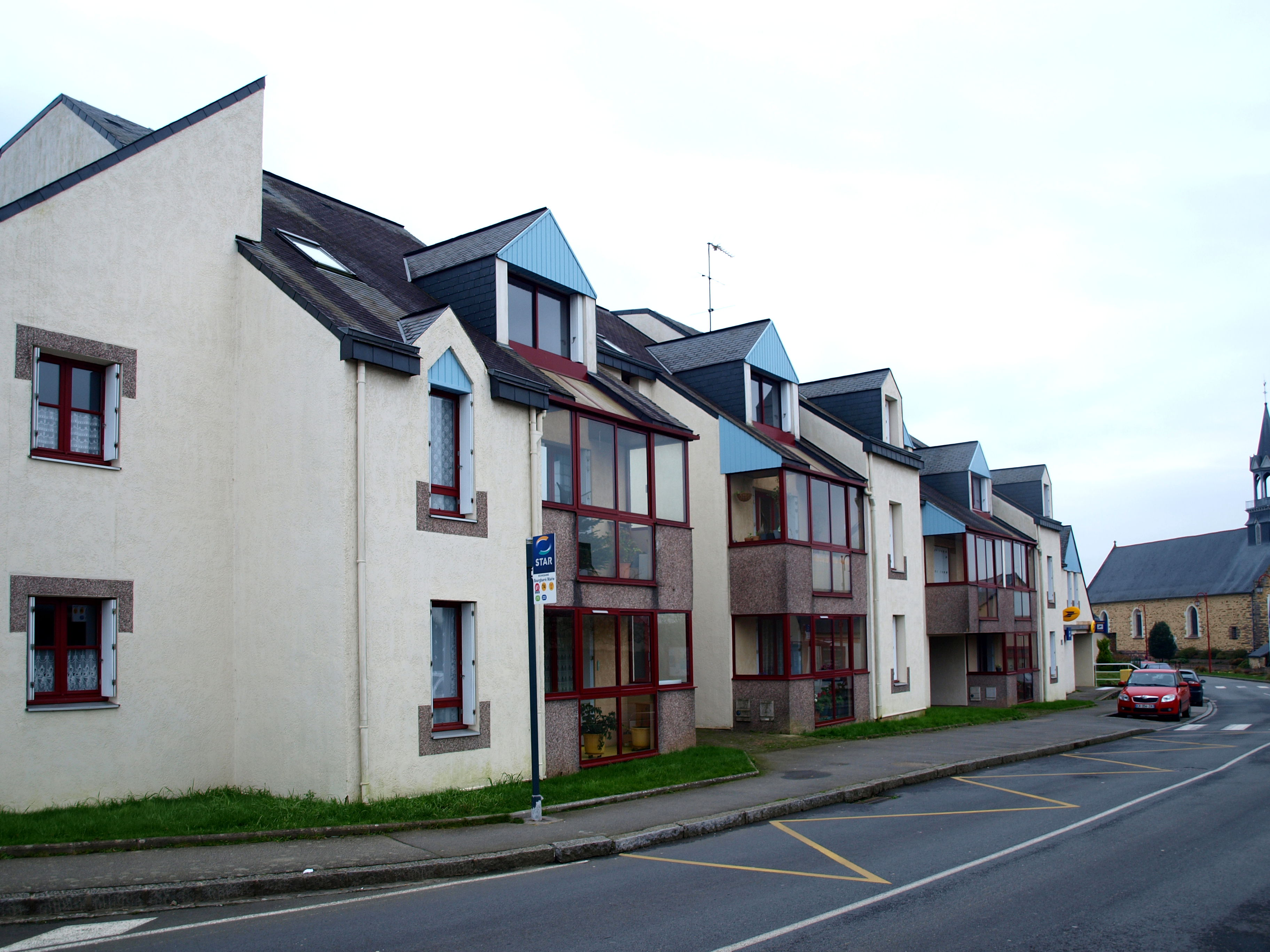 Bourgbarré (Ille-et-Vilaine, France)